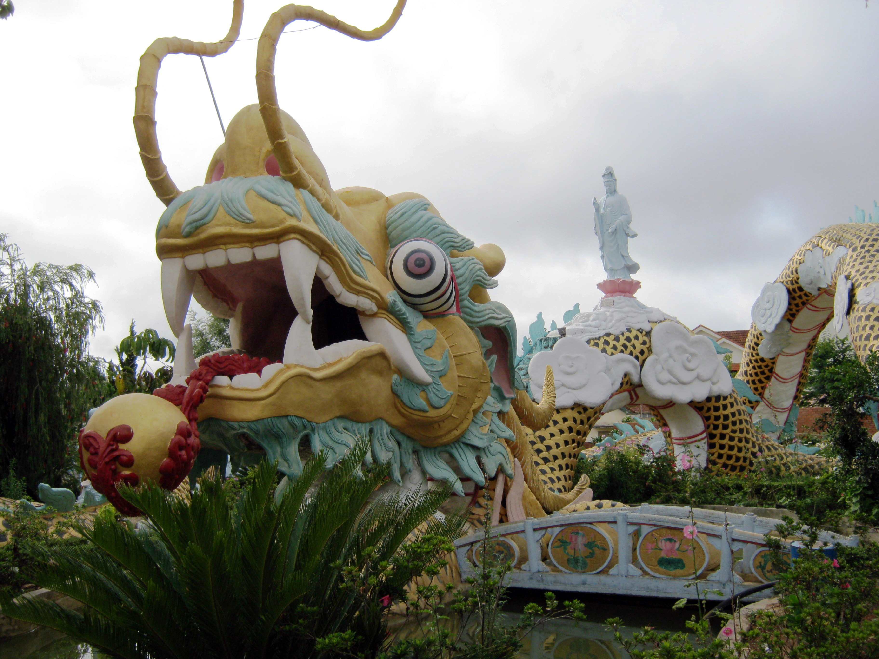 Rồng chùa Linh Quang (Đà Lạt, Việt Nam) bằng xi măng cốt thép, được tạo tác rất mỹ thuật.